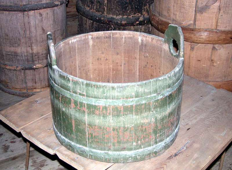 Lagget melkestamp fra Stor-Elvdal i Hedmark, merket J & M MYKLEBY under bunnen. Diameter 43.5 cm. Foto Haakon Harriss / Norsk Folkemuseum, NFL.15831.